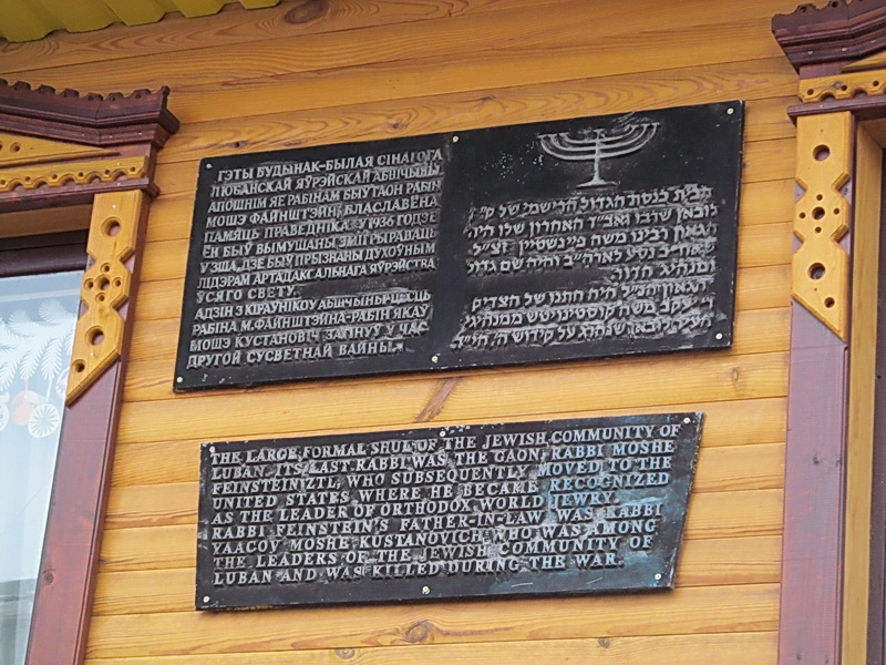 Любань. Новая сінагога